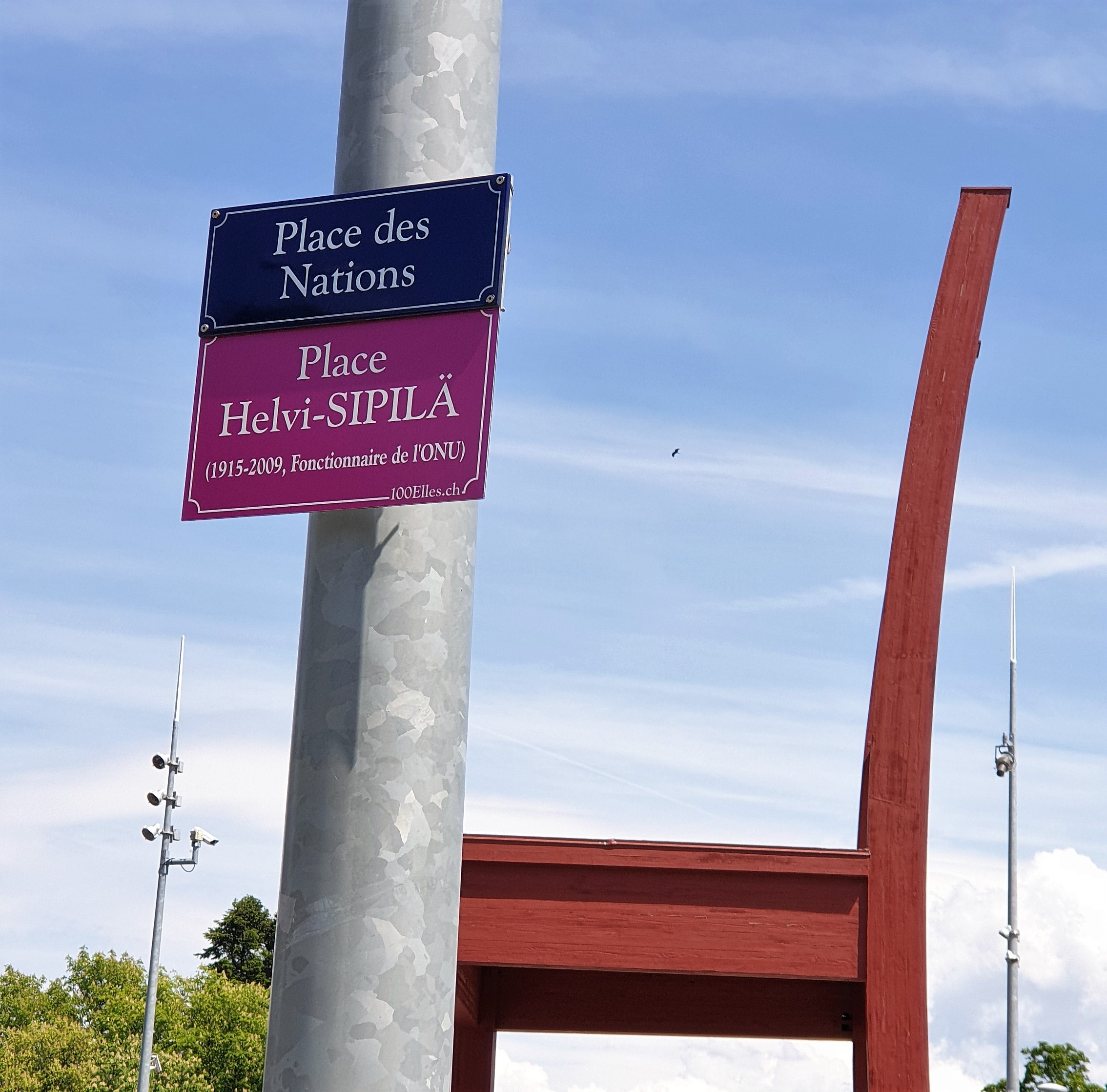 Plaque temporaire de rue apposée dans le cadre du projet 100elles à Genève en 2019